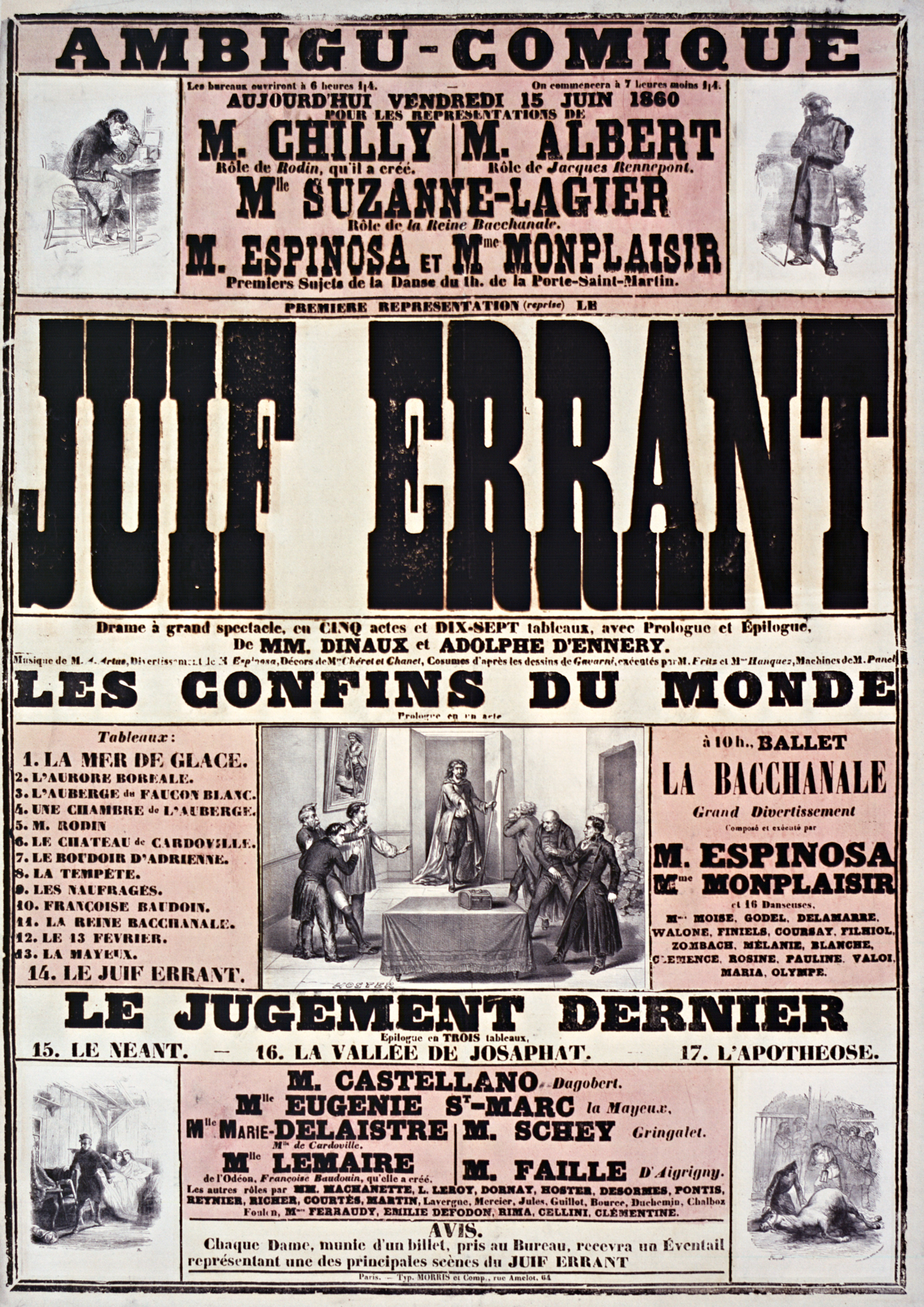 Ambigu-Comique... Aujourd'hui vendredi 15 juin 1860... Première représentation (reprise) : Le Juif errant, drame à grand spectacle en cinq actes et dix sept tableaux, avec prologue et épilogue de MM. Dinaux et Adolphe d'Ennery (en collaboration avec Eugène Sue). Musique de M. A. Artus : affiche - Thème : Juif errant